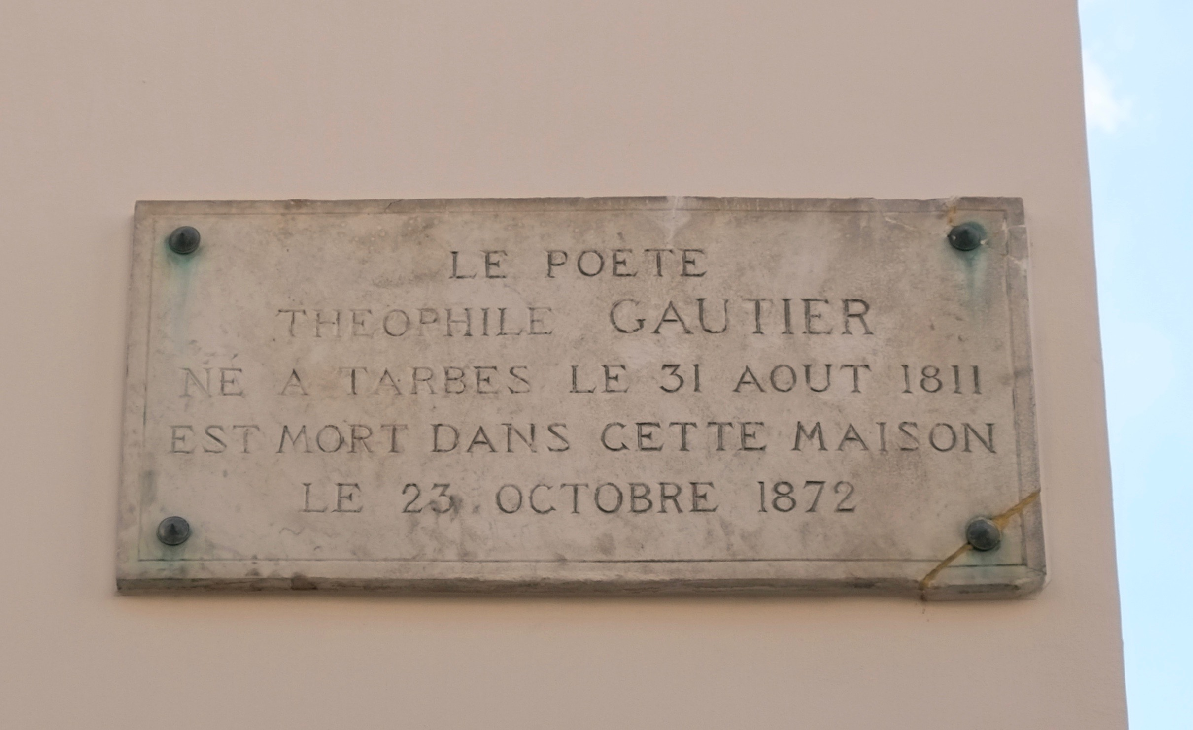 Gedenktafel für Théophile Gautier in Neuilly-sur-Seine, 28 rue de Longchamp (siehe [1])